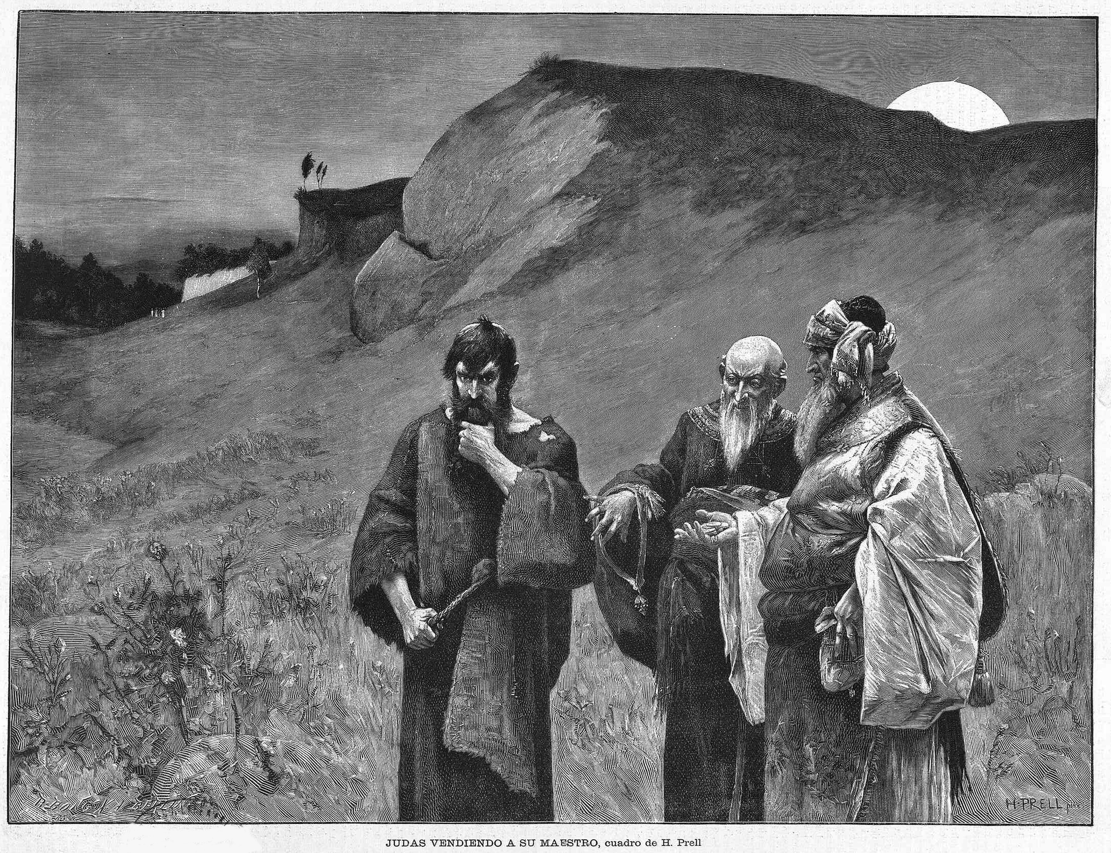 Judas vendiendo a su maestro, obra del pintor Hermann Prell, recogida en la revista española La Ilustración Artística.